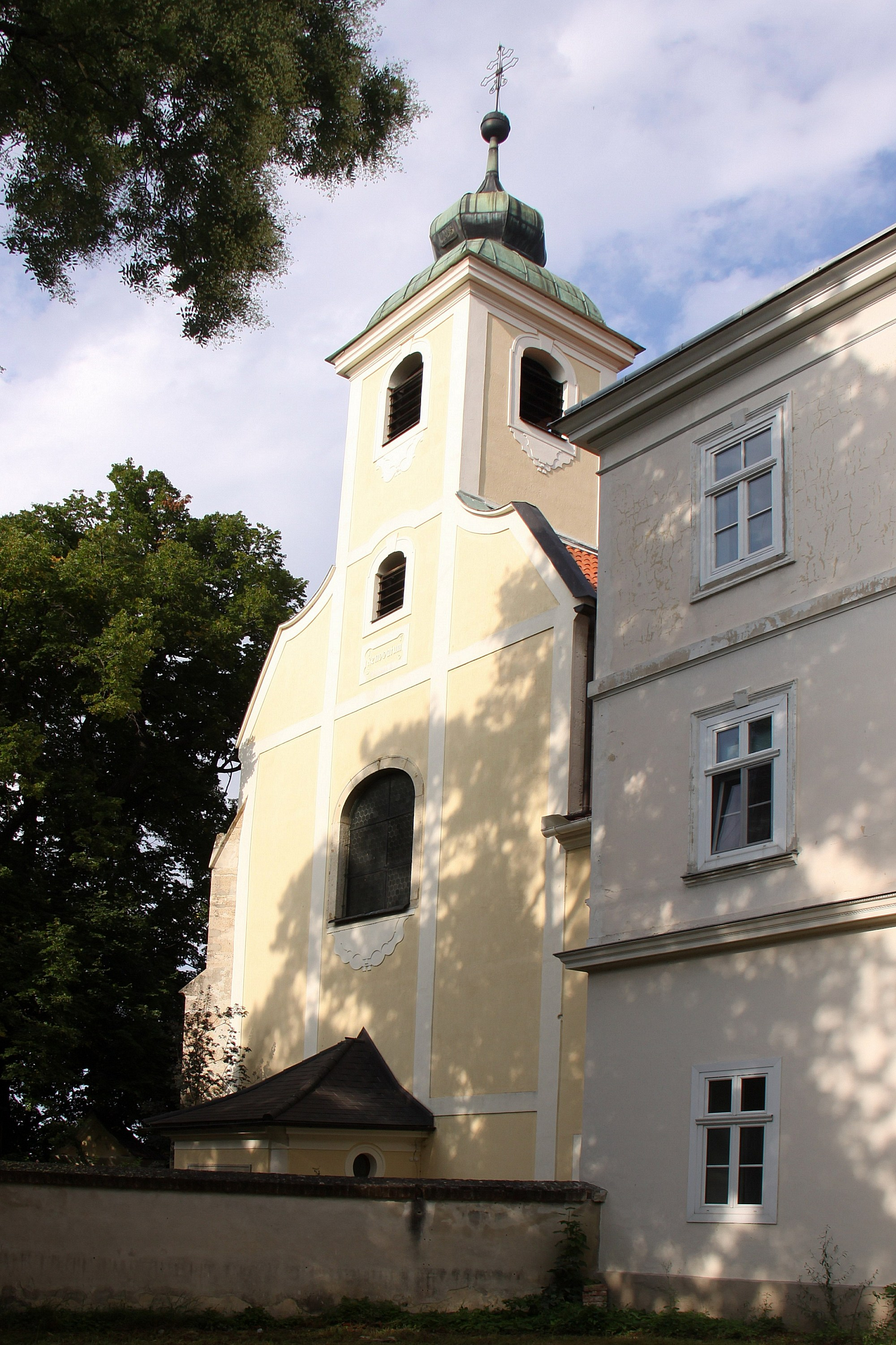 Denkmalgeschützte Pfarrkirche hl. Radegunde in Katzelsdorf. Object location47° 46′ 09.16″ N, 16° 16′ 24.31″ E